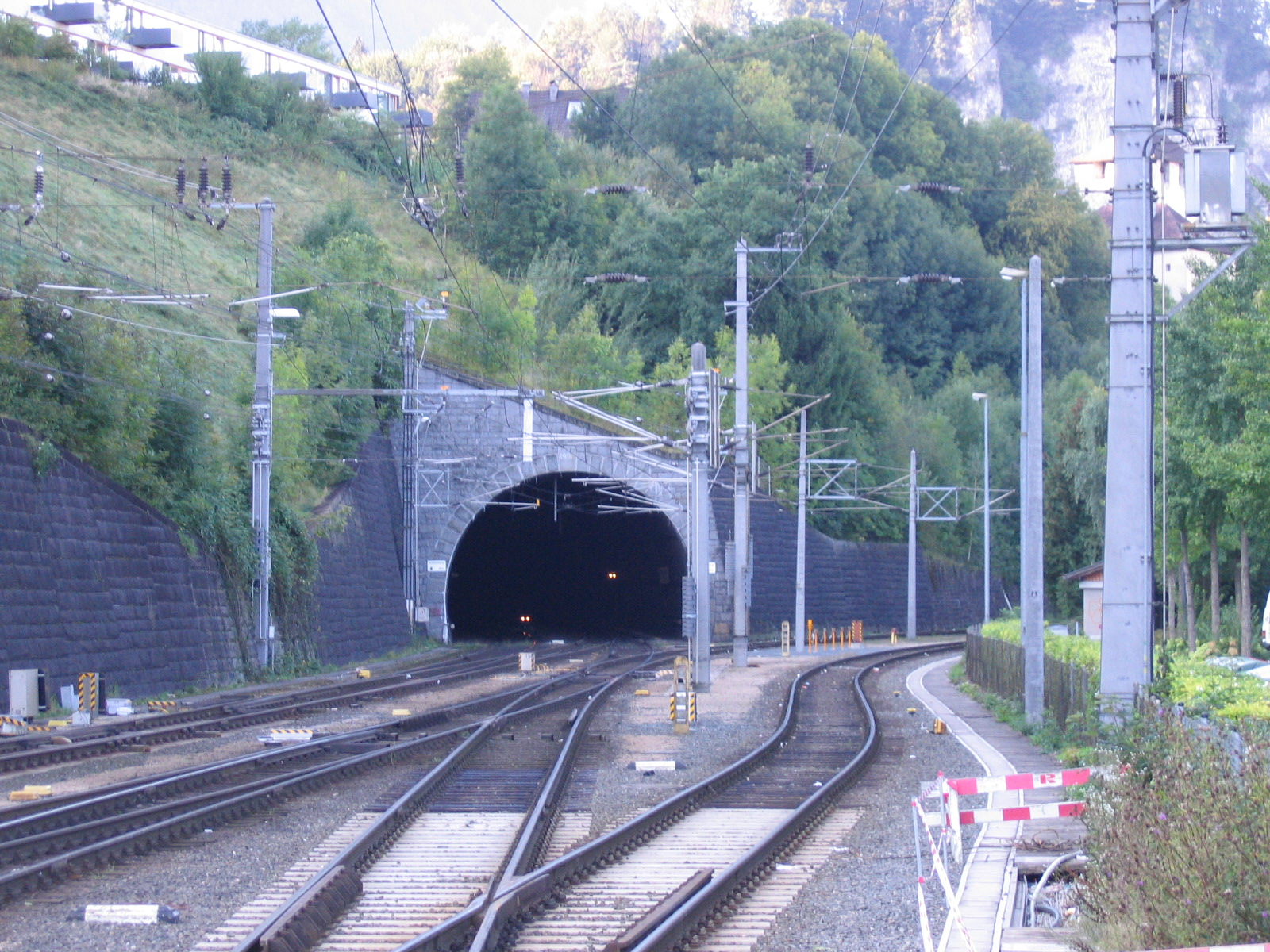 Feldkirch Eisenbahntunnel unter Schattenburg vom Bahnhof Feldkirch aus